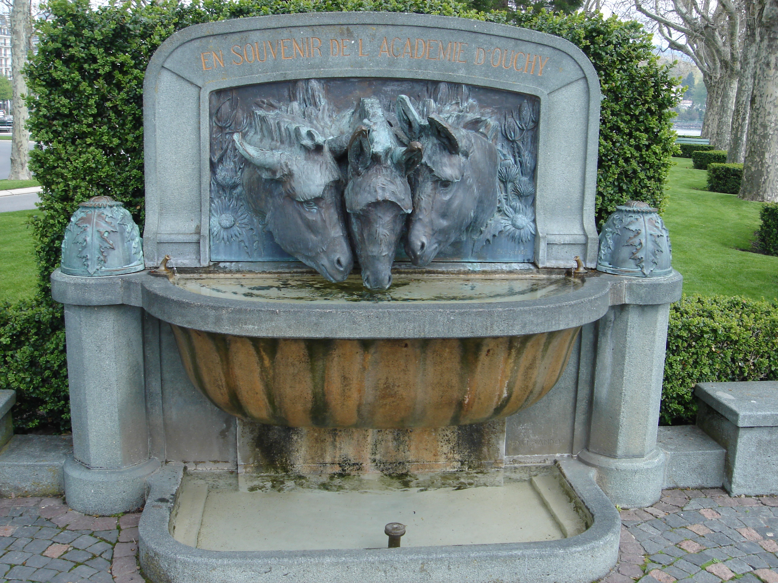 Питьевой фонтанчик, Лозанна